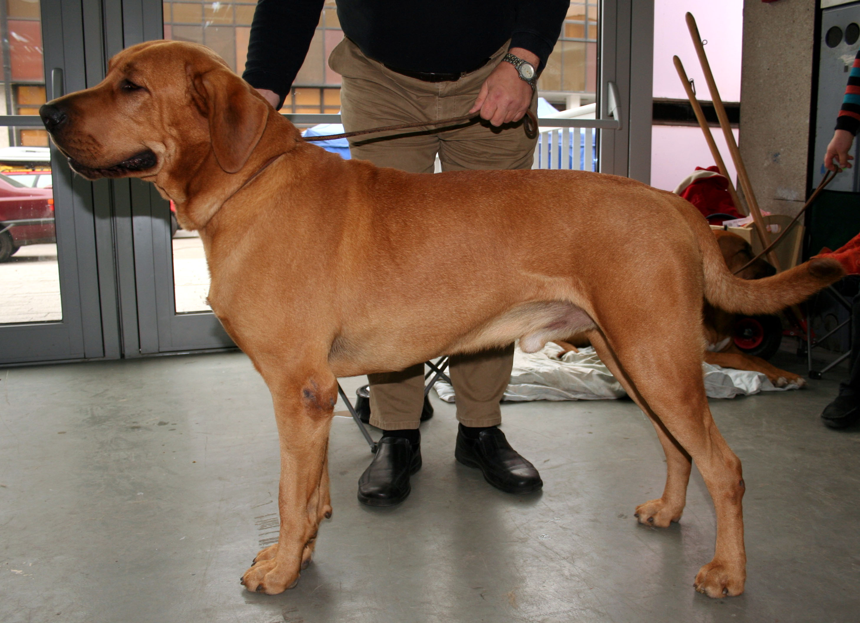 Broholmer na Światowej Wystawie Psów Rasowych w Poznaniu